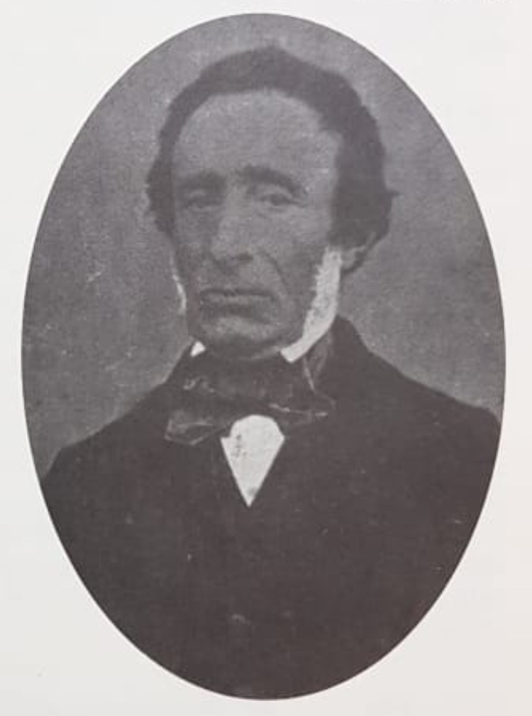 Ritratto dell'illustre scienziato Filippo Cassola